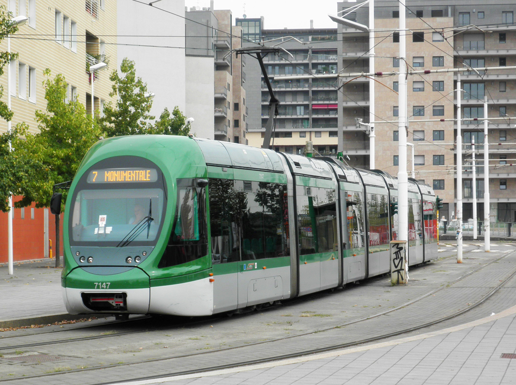 Vettura tranviaria 7147 a Milano in piazzale Egeo.